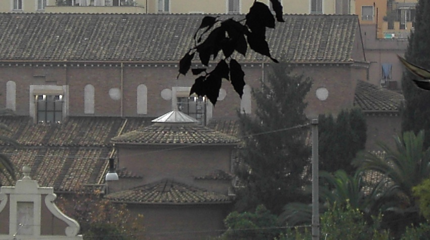 Clemente